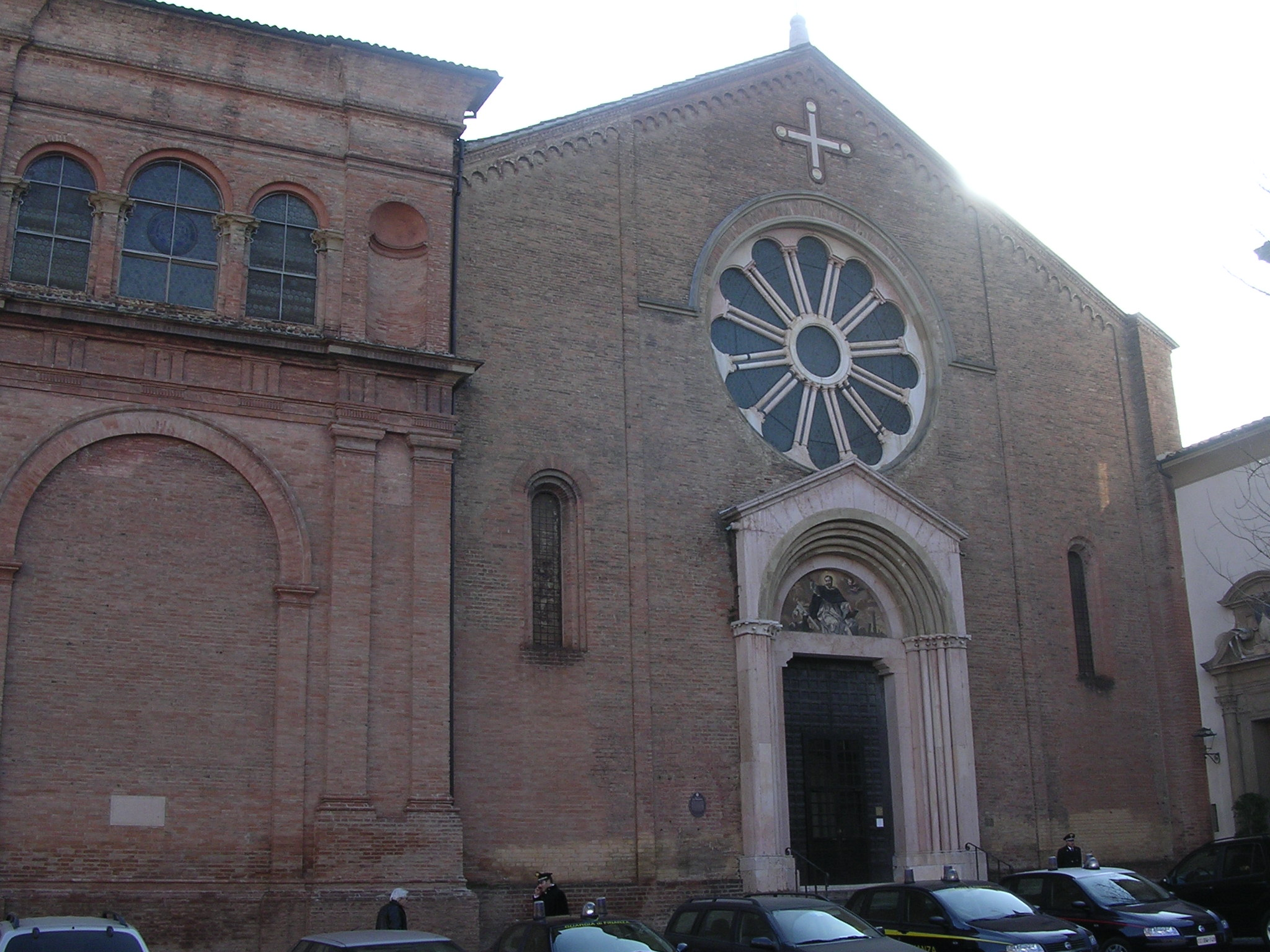 Chiesa di San Domenico, Bologna